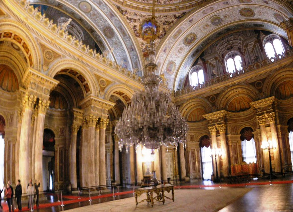 Ceremonial Hall (Muayede Salonu) in Dolmabahçe Palace